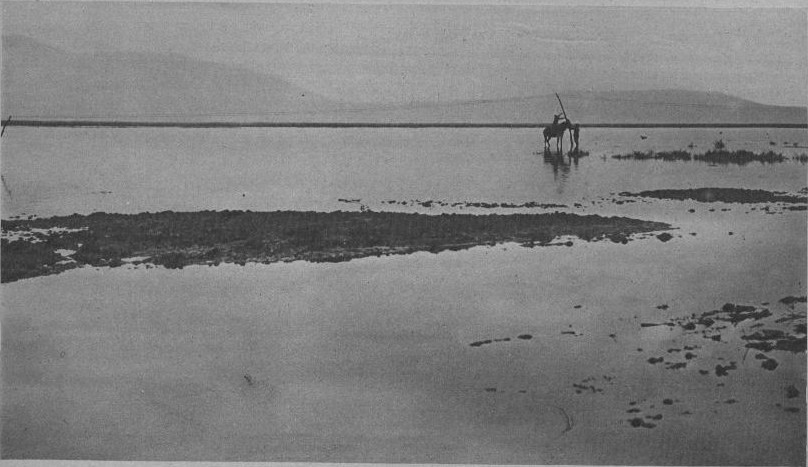 Réparation d'un ligne téléphonique dans la plaine de Monastir en février 1917.